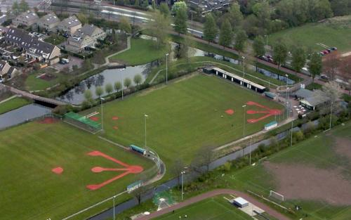 Accommodatie HSV Adegeest